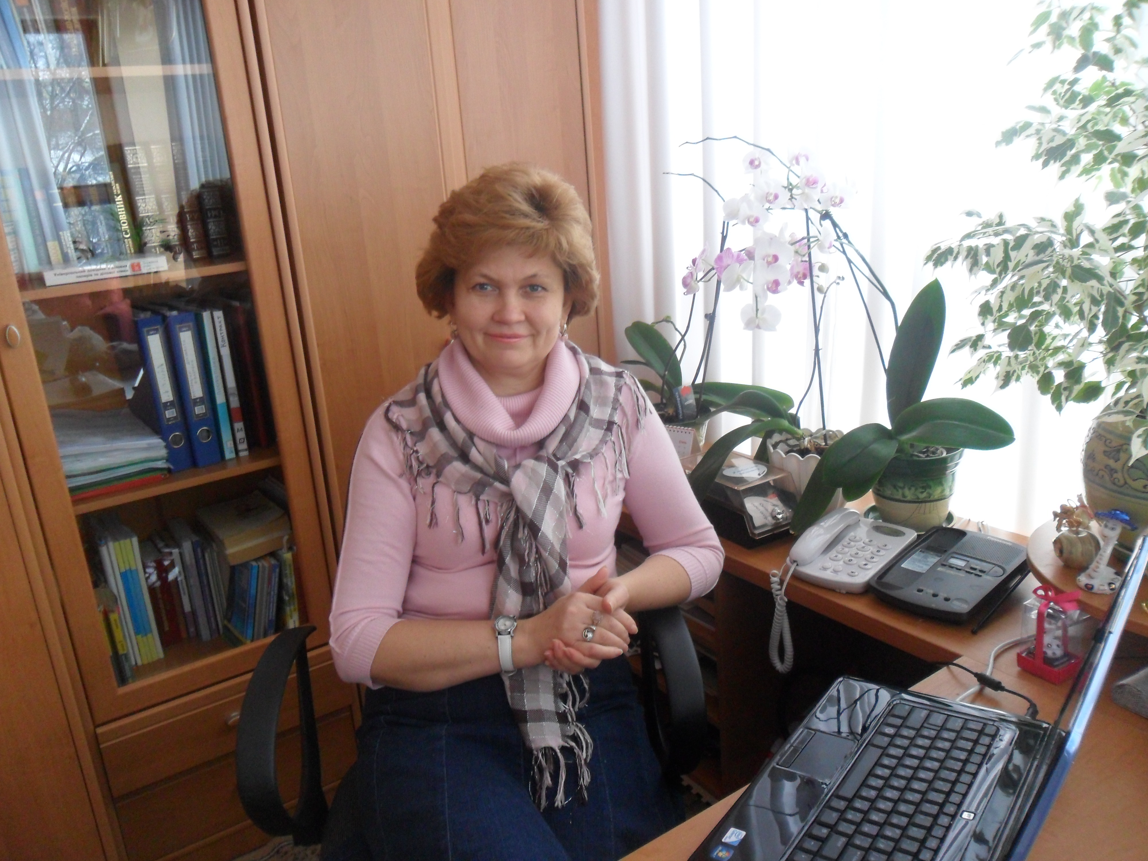 Директор бібліотеки з 1999